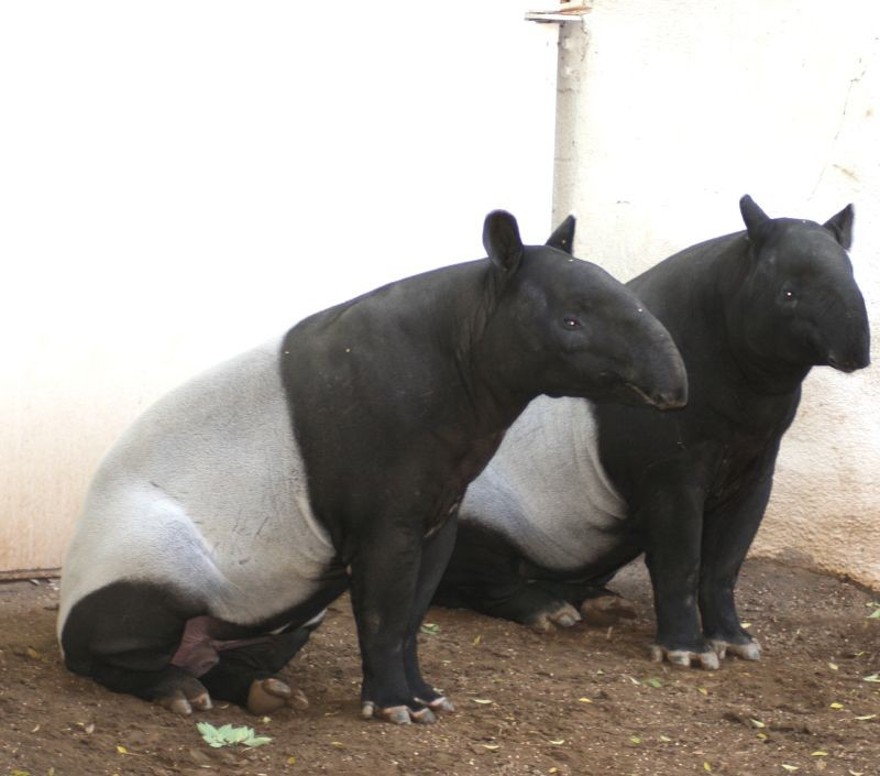 Tapirus indicus